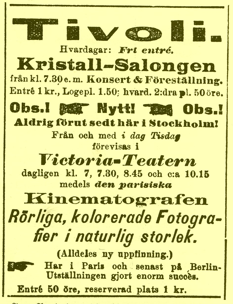 Stockholms första biografannons i Stockholms-Tidningen